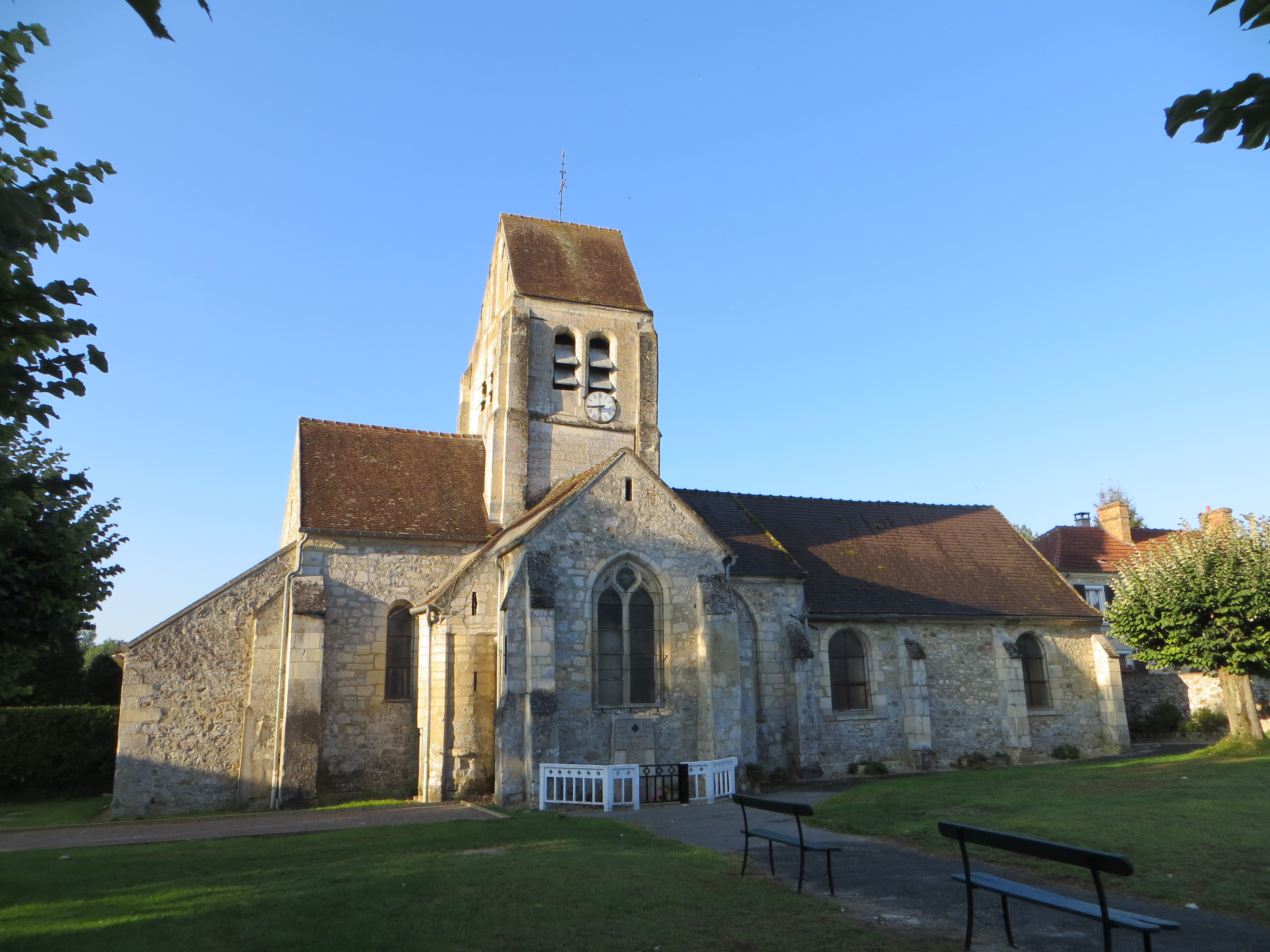 Vue générale de l'église